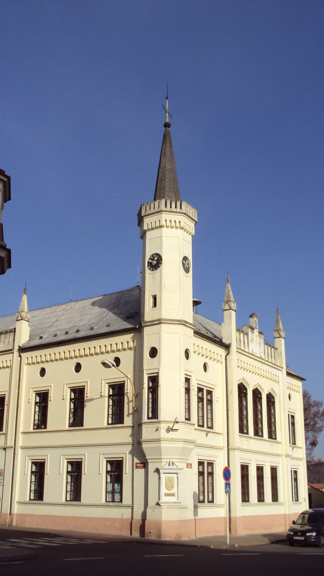 Budova radnice na náměstí v Zákupech